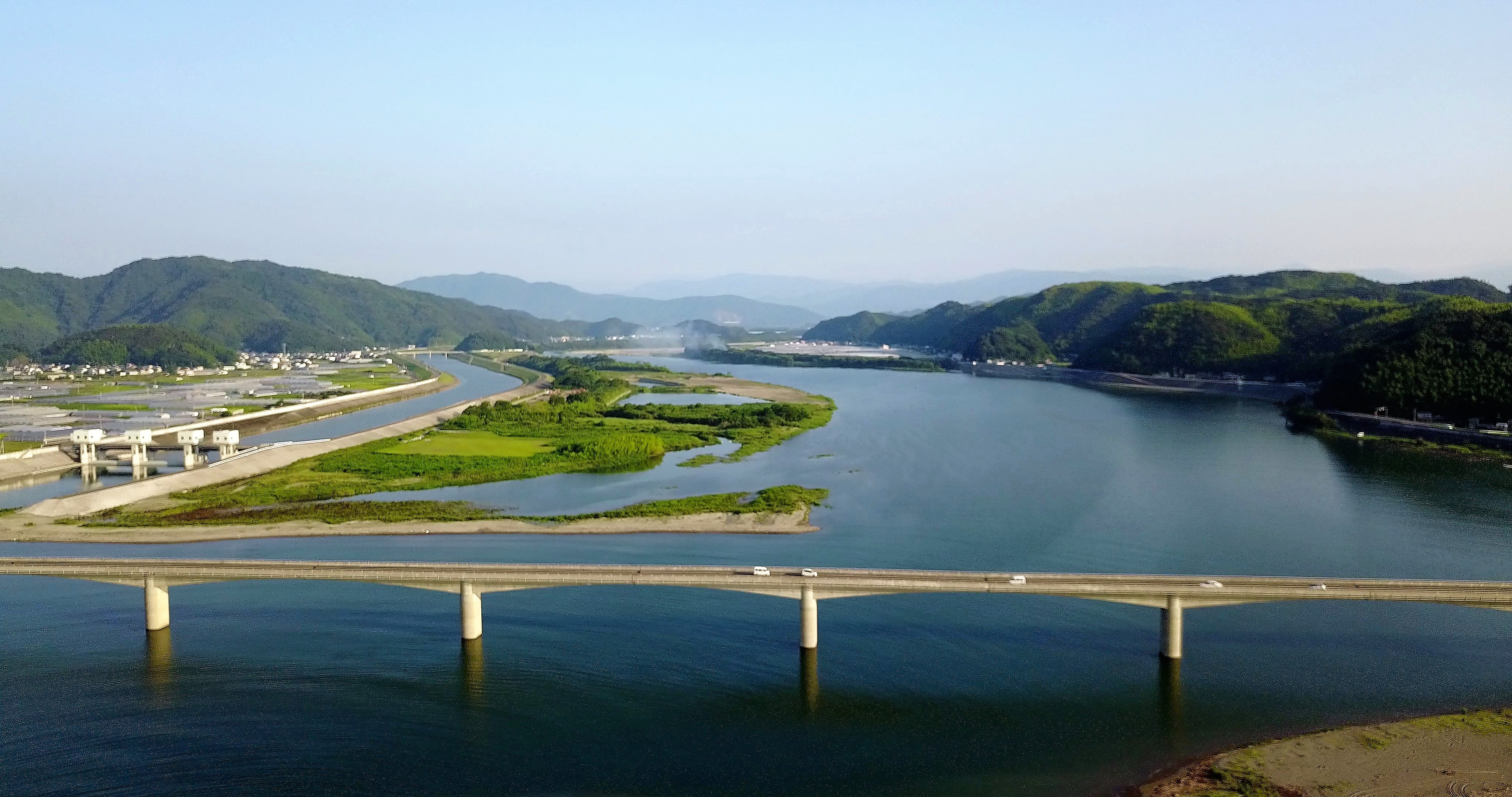 仁淀川河口大橋の空撮写真